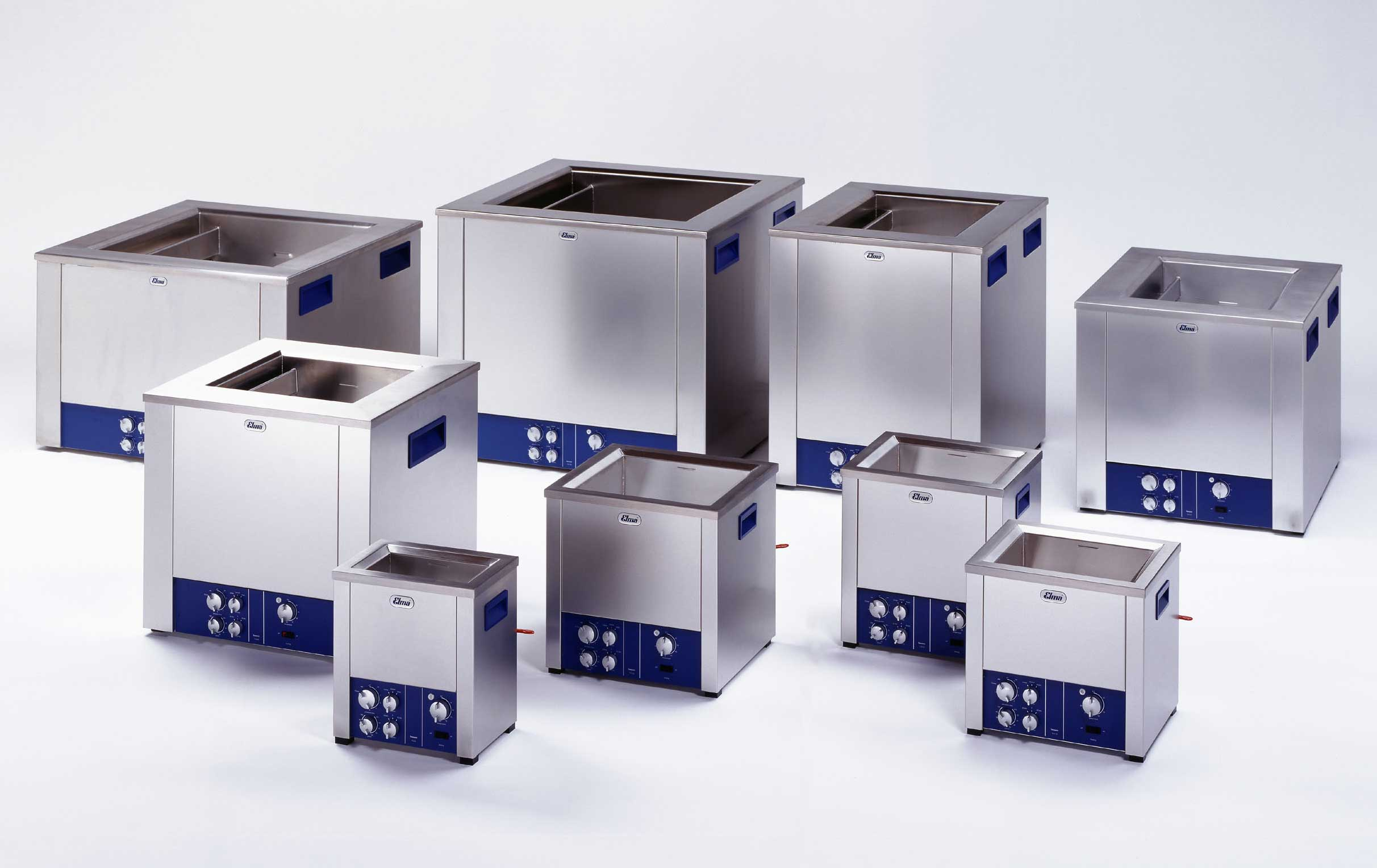 UZčističky